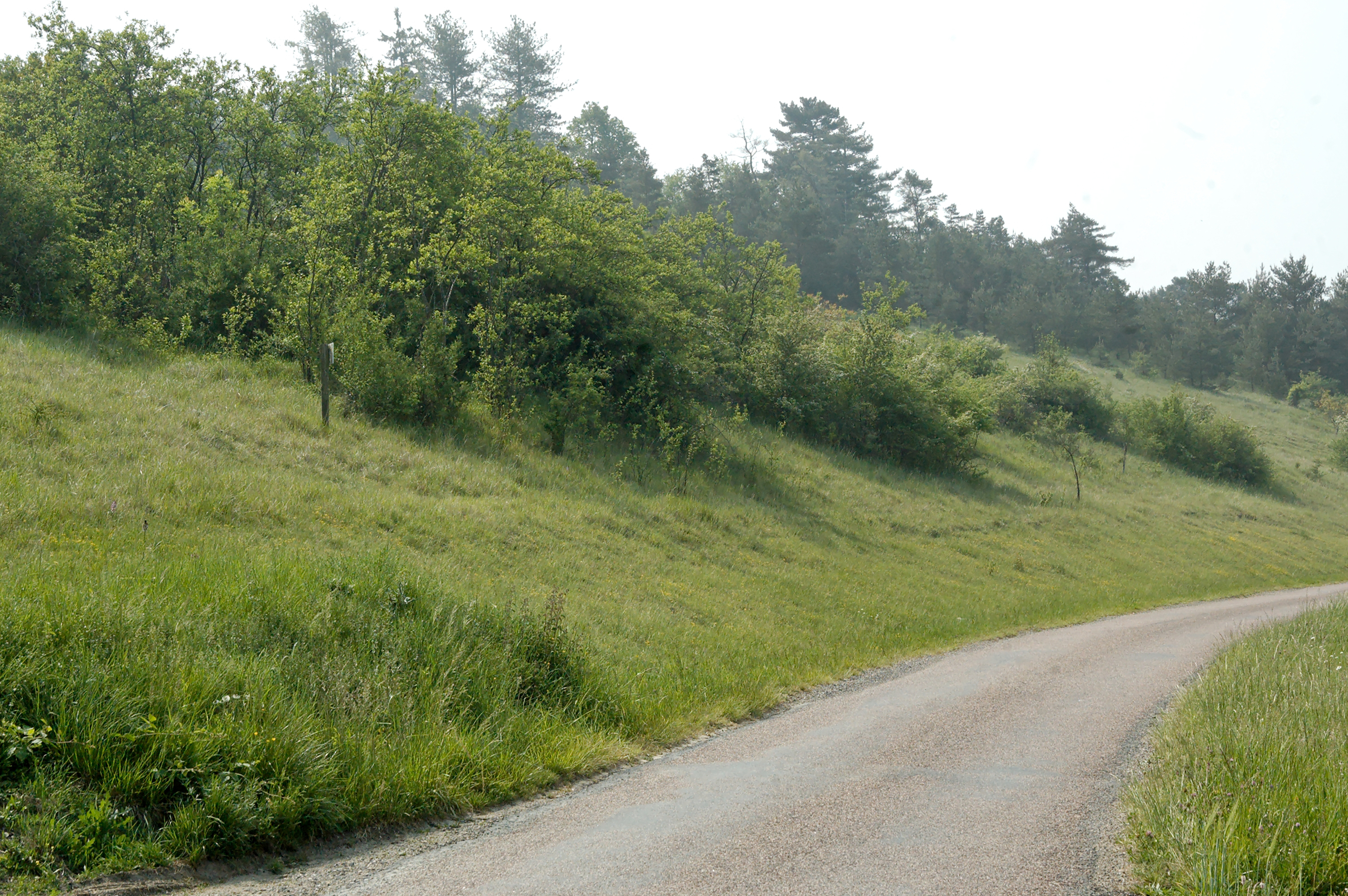 La butte Beaumont en descendant vers Condé-en-Brie: s'y trouvent les vestiges d'un site romain fortifié (maintenant privé).